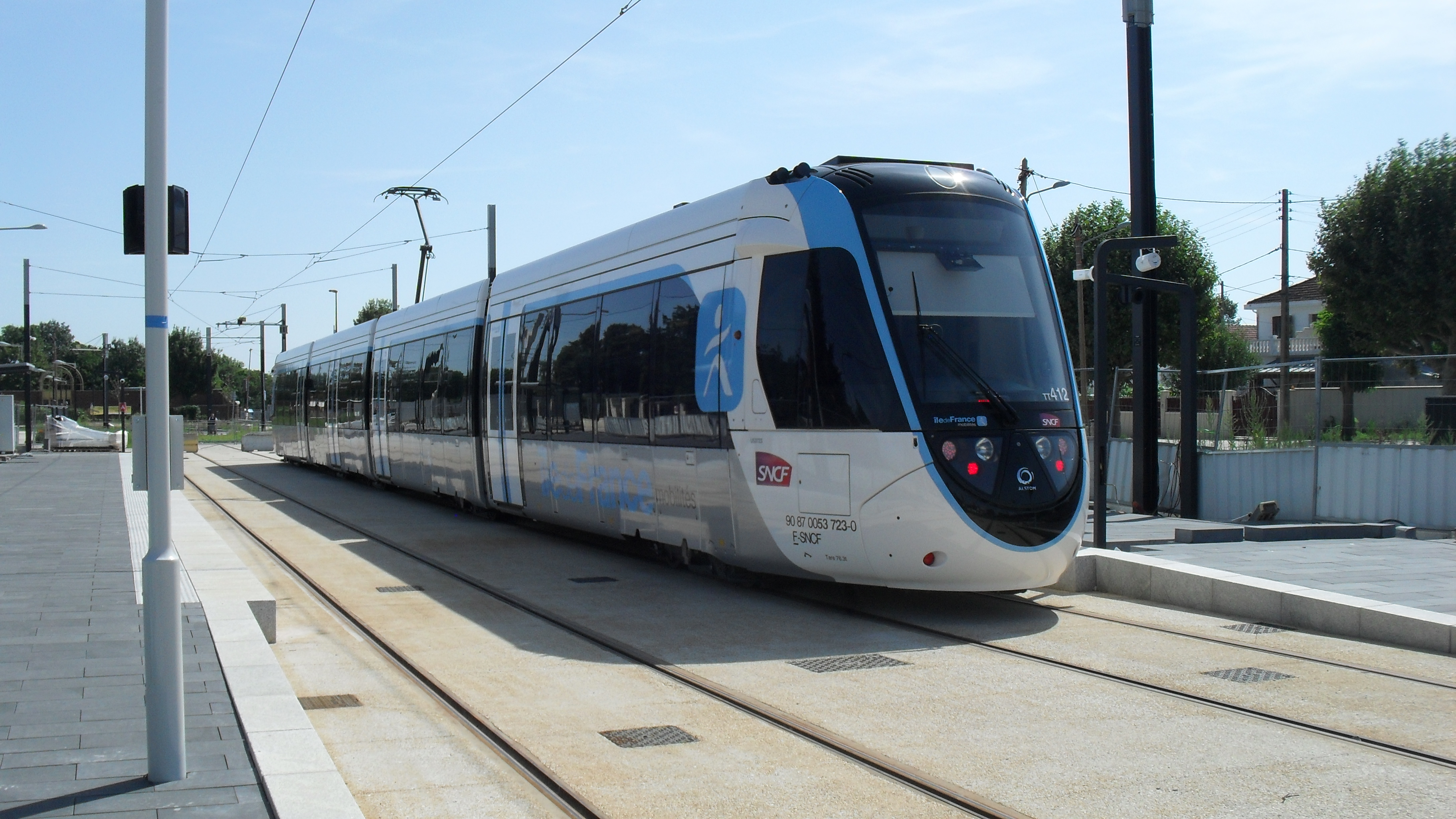 Tram-train U53700 en essais à la future station Arboretum